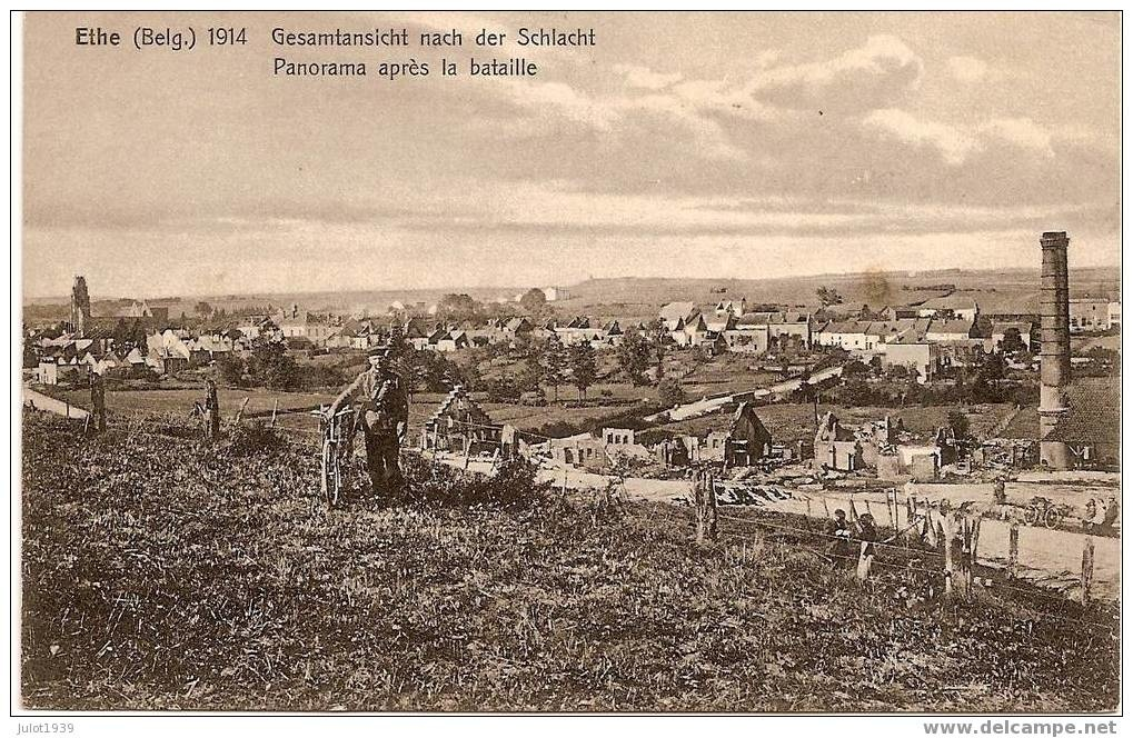 Etheko herria han gertatutako gudua eta gero